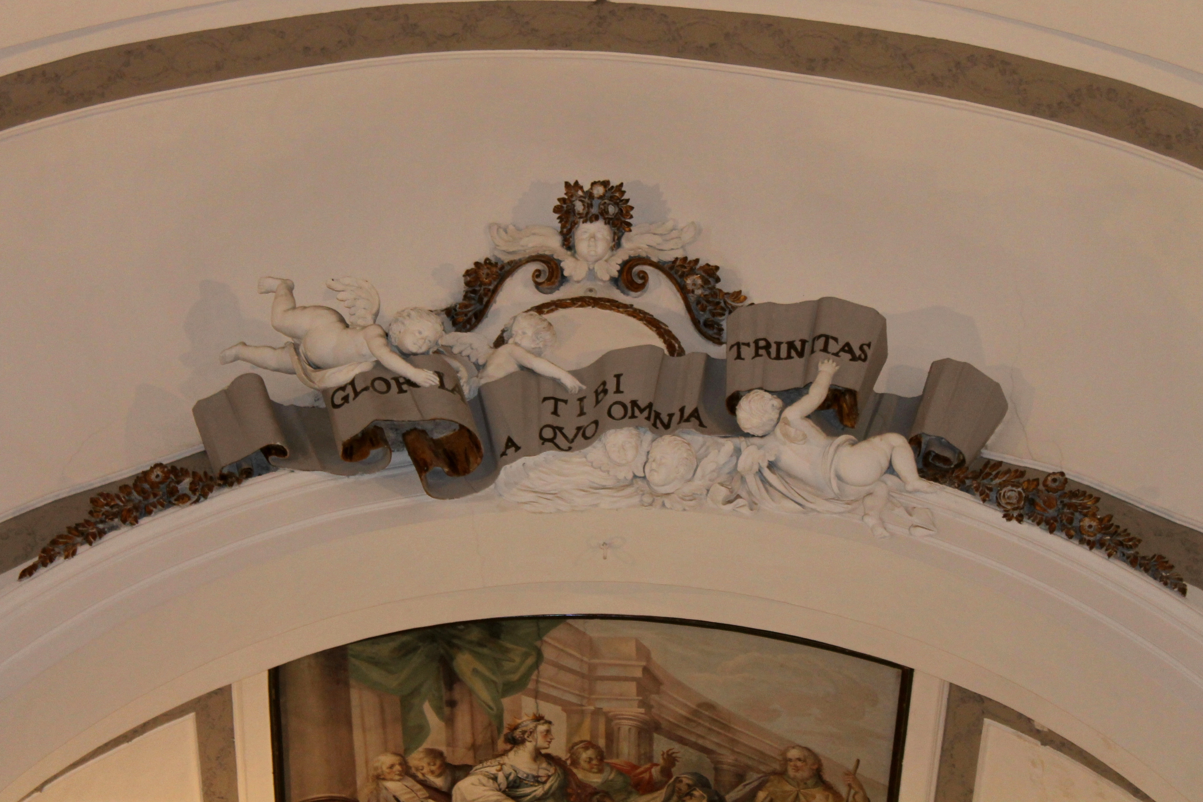 La chiesa dedicata alla S.S. Trinità e San Marziano sorge sulle rovine del cinquecentesco palazzo La Palumba. Costruita dopo il terremoto del 1693, la sua struttura si presenta a torretta, svettante verso l'alto: dalle sue terrazze e possibile ammirare paesaggi mozzafiato. Al suo interno custodisce opere di grande fattura, fra cui un bellissimo affresco di Sebastiano Lo Monaco nella volta della navata. Il pavimento è interamente ricoperta di ceramica di Caltagirone del XVIII secolo. Troviamo diverse tele, fra cui una crocifissione di Giuseppe Velasco e una pala raffigurante Sant'Antonio, del XIV sec, circa. La chiesa fa parte del gruppo dei monumenti nazionali.